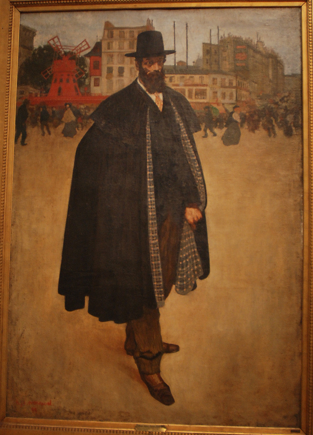 De Spanjaard te Parijs door Henri Evenepoel, Belgisch schilder (fauvist) in het Museum voor Schone Kunsten (Gent)